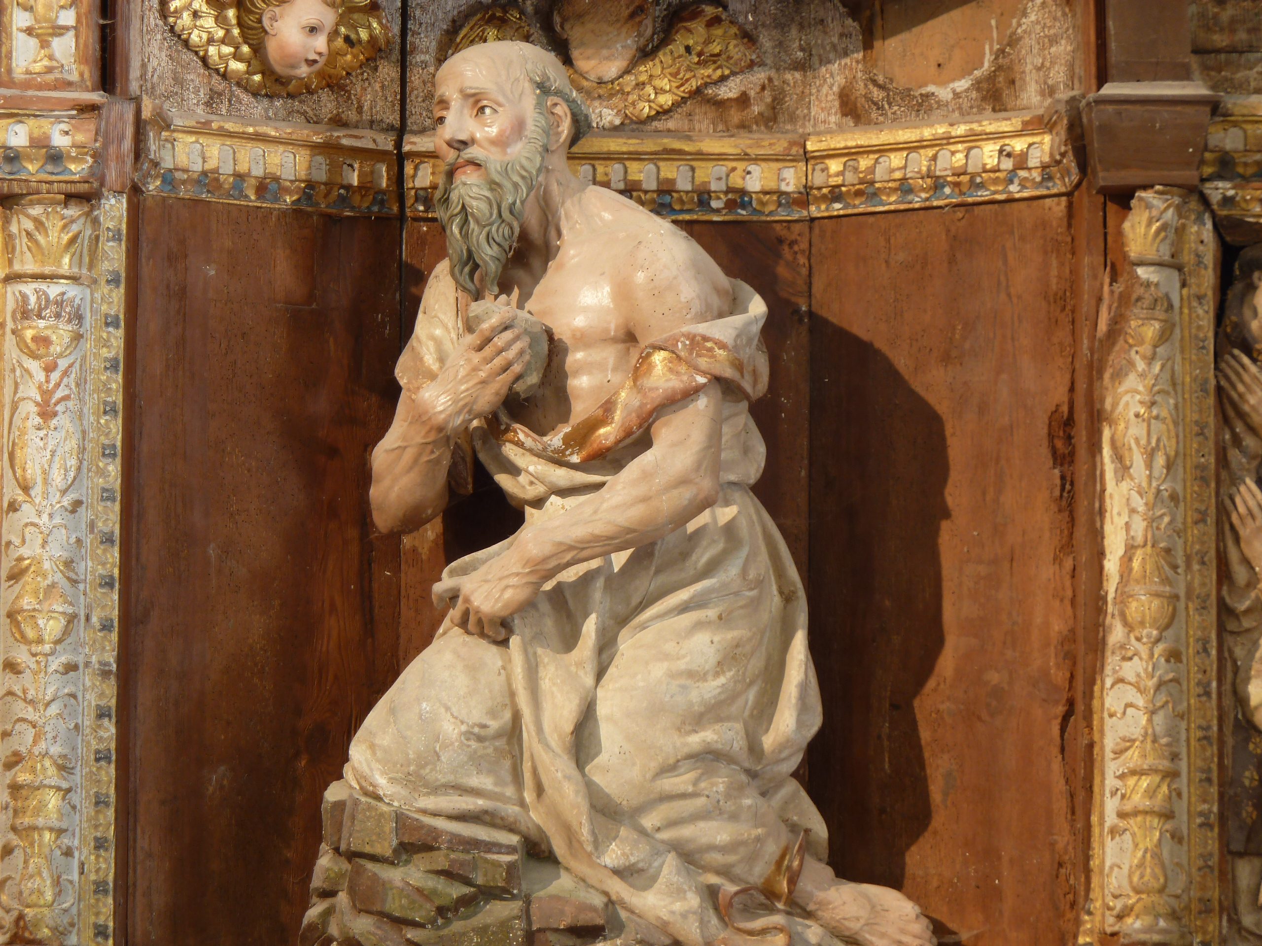 Preside el retablo una imagen de San Jerónimo penitente, sobre suelo rocoso de un paisaje desértico, con el tipo enjuto de asceta que se golpea el pecho desnudo con una piedra, aludiendo a su etapa eremítica penitencial. Hay una anécdota referente a cierta ocasión en la que el Papa Sixto V cuando vio un cuadro donde pintan a San Jerónimo dándose golpes de pecho con una piedra, exclamó: "¡Menos mal que te golpeaste duramente y bien arrepentido, porque si no hubiera sido por esos golpes y por ese arrepentimiento, la Iglesia nunca te habría declarado santo, porque eras muy duro en tu modo de corregir!".